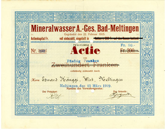 Mineralwasser A.-Ges. Bad-Meltingen SO, Schweiz: Emission 15.9.1919, Nominalwert Fr. 200, später Fr. 50